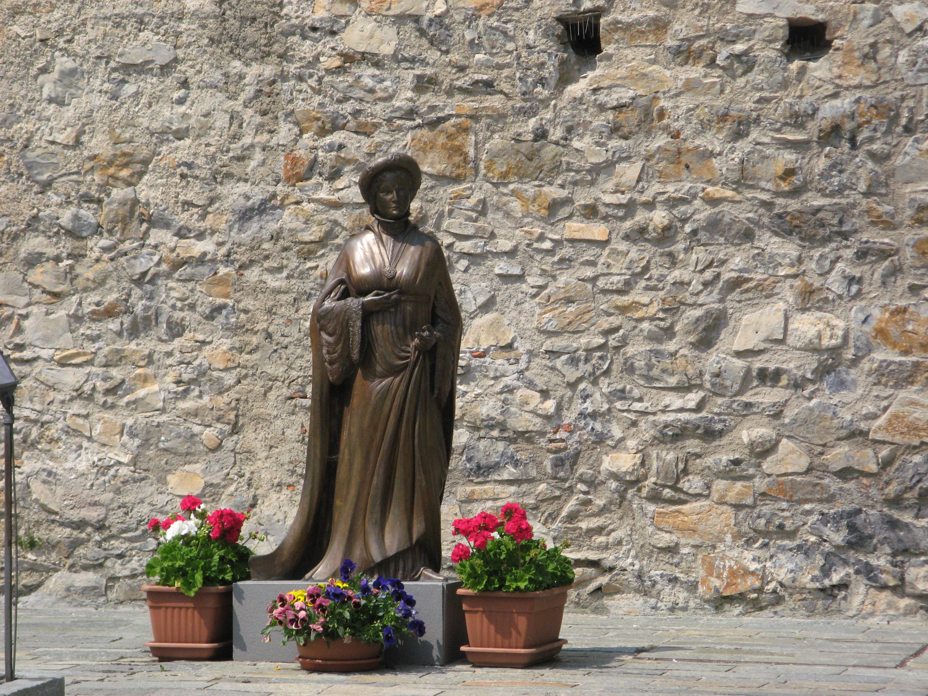 Statua raffigurante Ilaria del Carretto (dello scultore ingauno Flavio Furlani) posta all'ingresso di Zuccarello (Savona) capoluogo del Marchesato del Carretto.